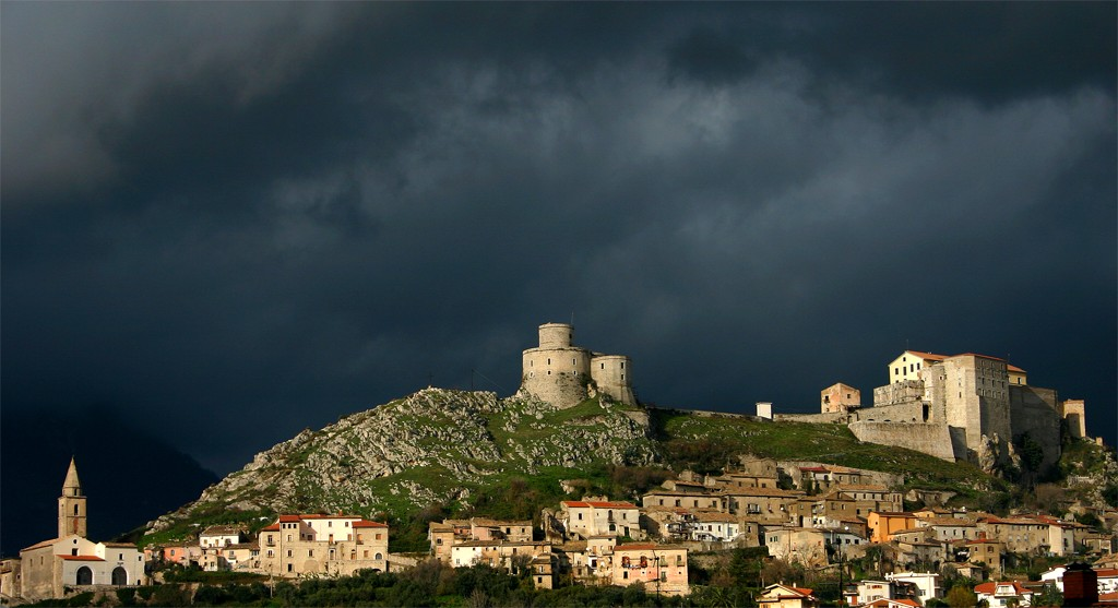 Il centro storico di Montesarchio